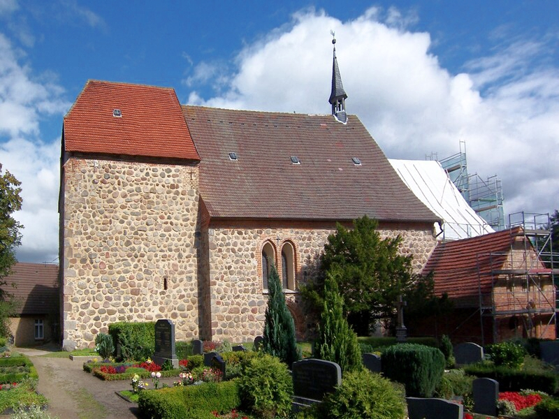 Kirche in Petschow, Landkreis Bad Doberan